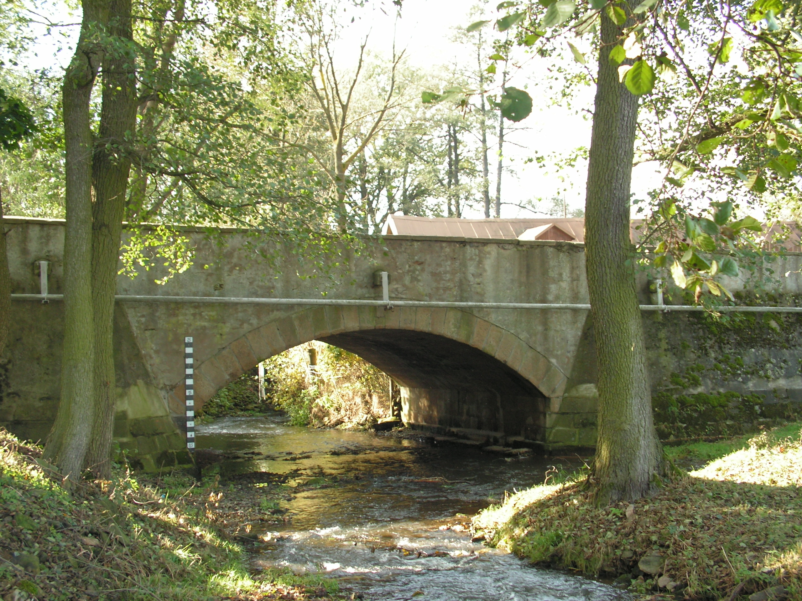 Kamenný most v Habrech přes říčku Sázavku v okrese Havlíčkův Brod. Most byl postaven v roce 1825.